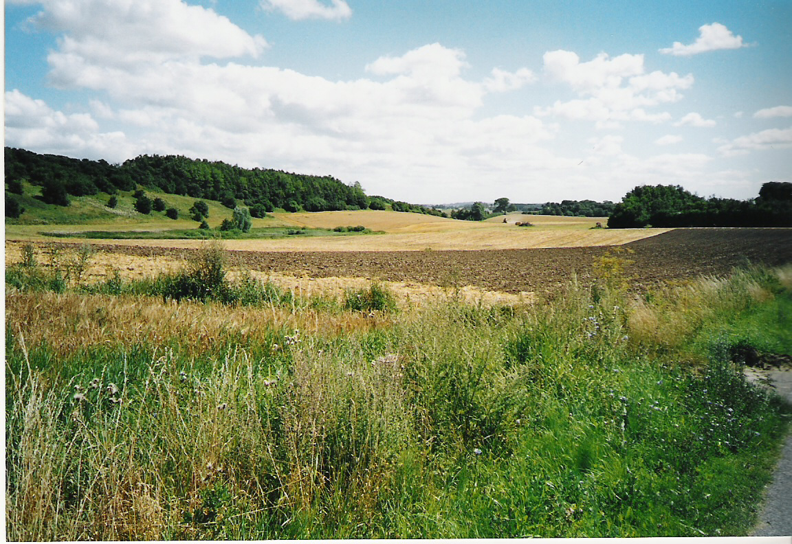 Strø Bjerge nordvest